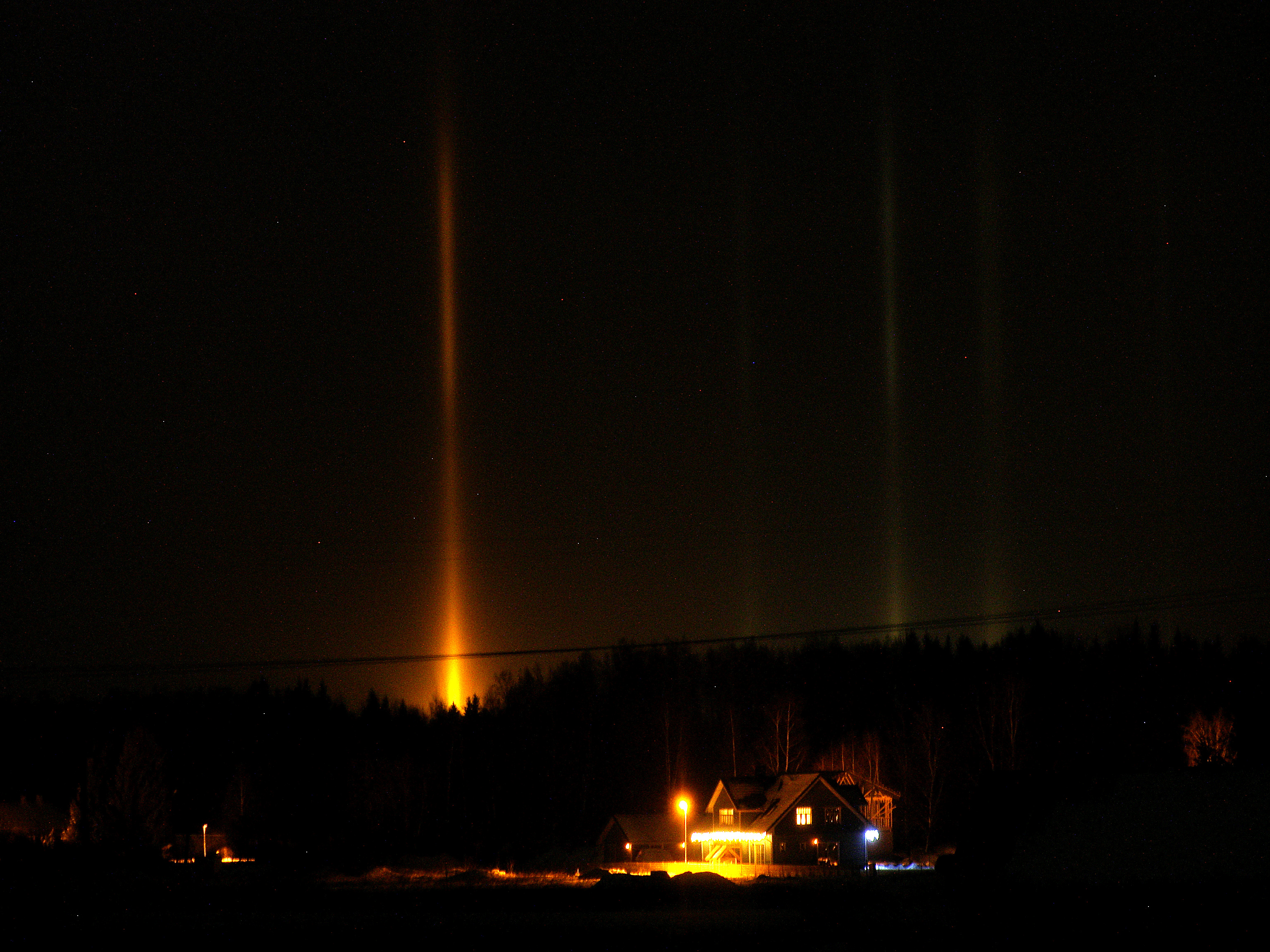 Eredam kollane sammas tekib tõenäoliselt Jänese raudteesilda valgustavast prožektorist, mis ise on puude taga. Tavaliselt on sellest näha vaid vaevumärgatav täpike või peegeldub hajutatud valgus pilvedelt. Pilt on tehtud kaameraga Olympus SP510UZ, säriajaga 15 sekundit